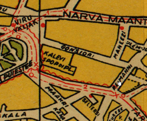 Tallinna kaart, Kalevi spordiplats